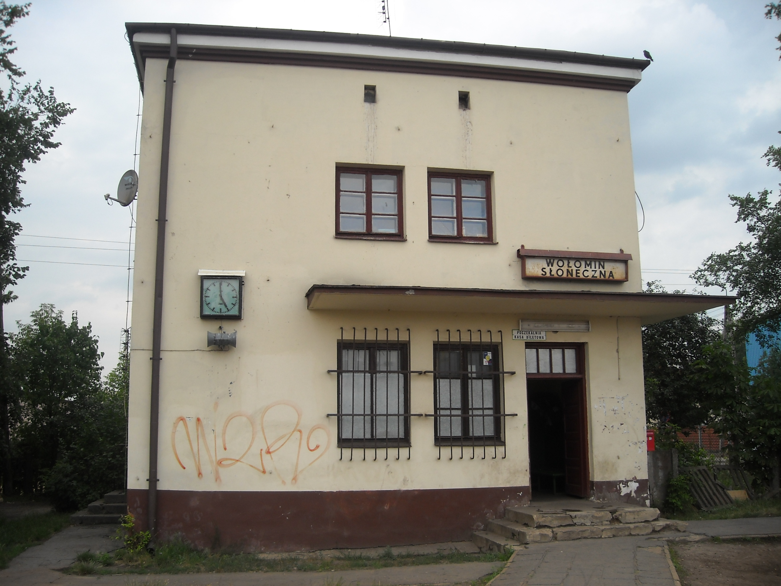 Budynek stacyjny mieszczący kasy biletowe i poczekalnię na przystanku Wołomin Słoneczna.